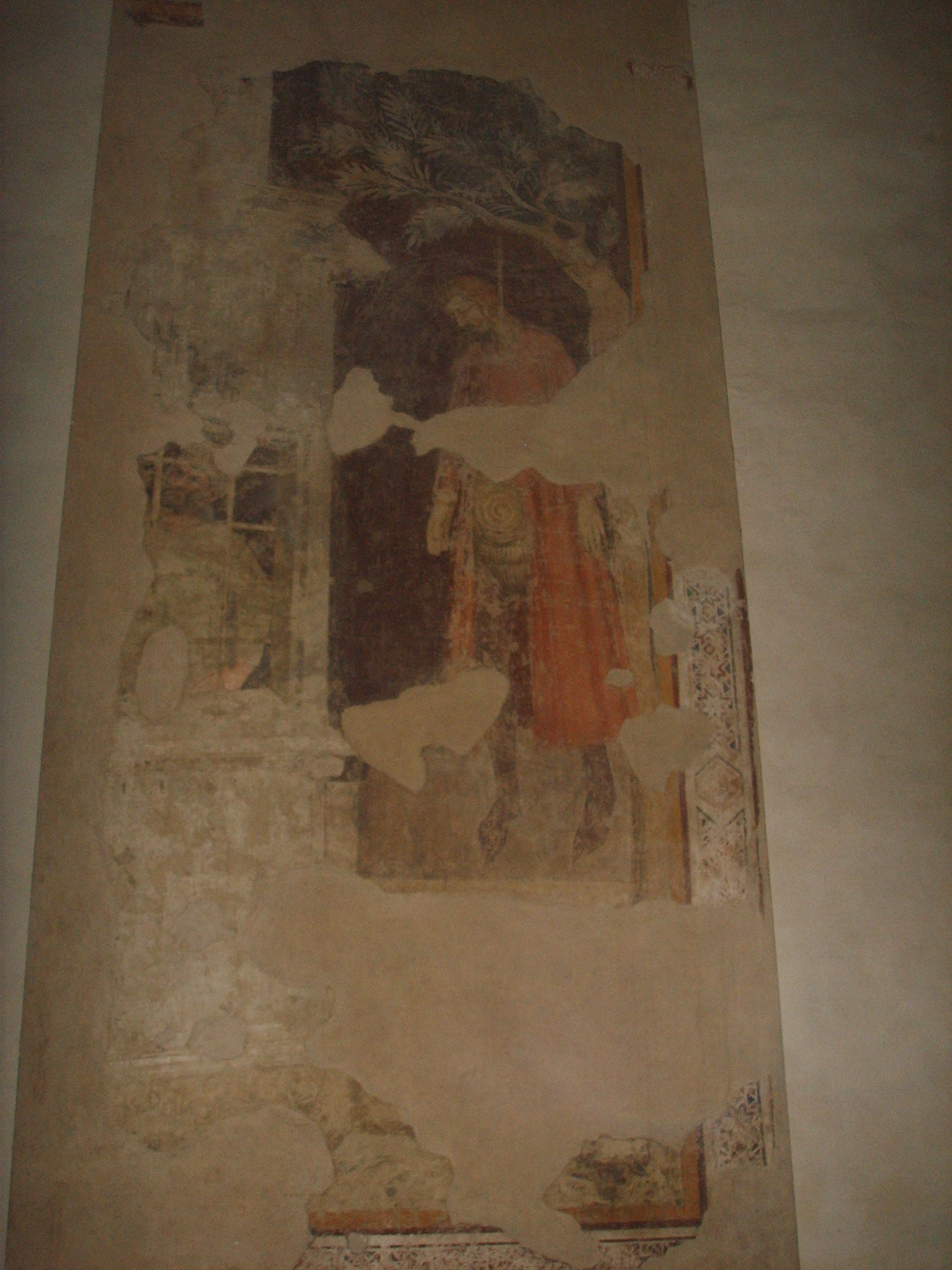 Badia Fiorentina church nardo_di_cione_(attribuzione),_cappella_di_san_bernardo in Florence, italy